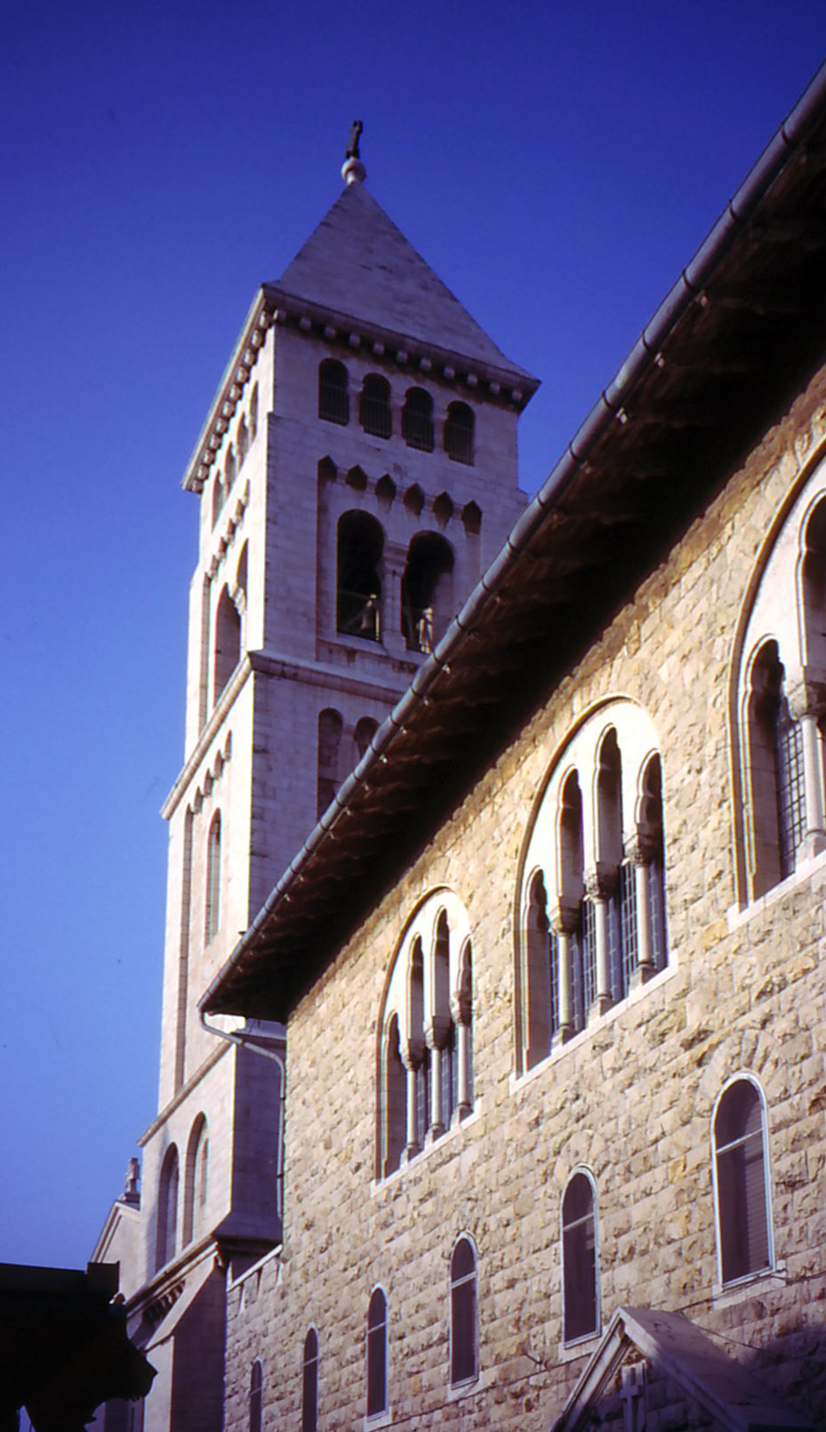 Lutheran Church of the Redeemer, Jerusalem (Old City) Evangelisch-Lutherische Erlöserkirche in der Altstadt von Jerusalem